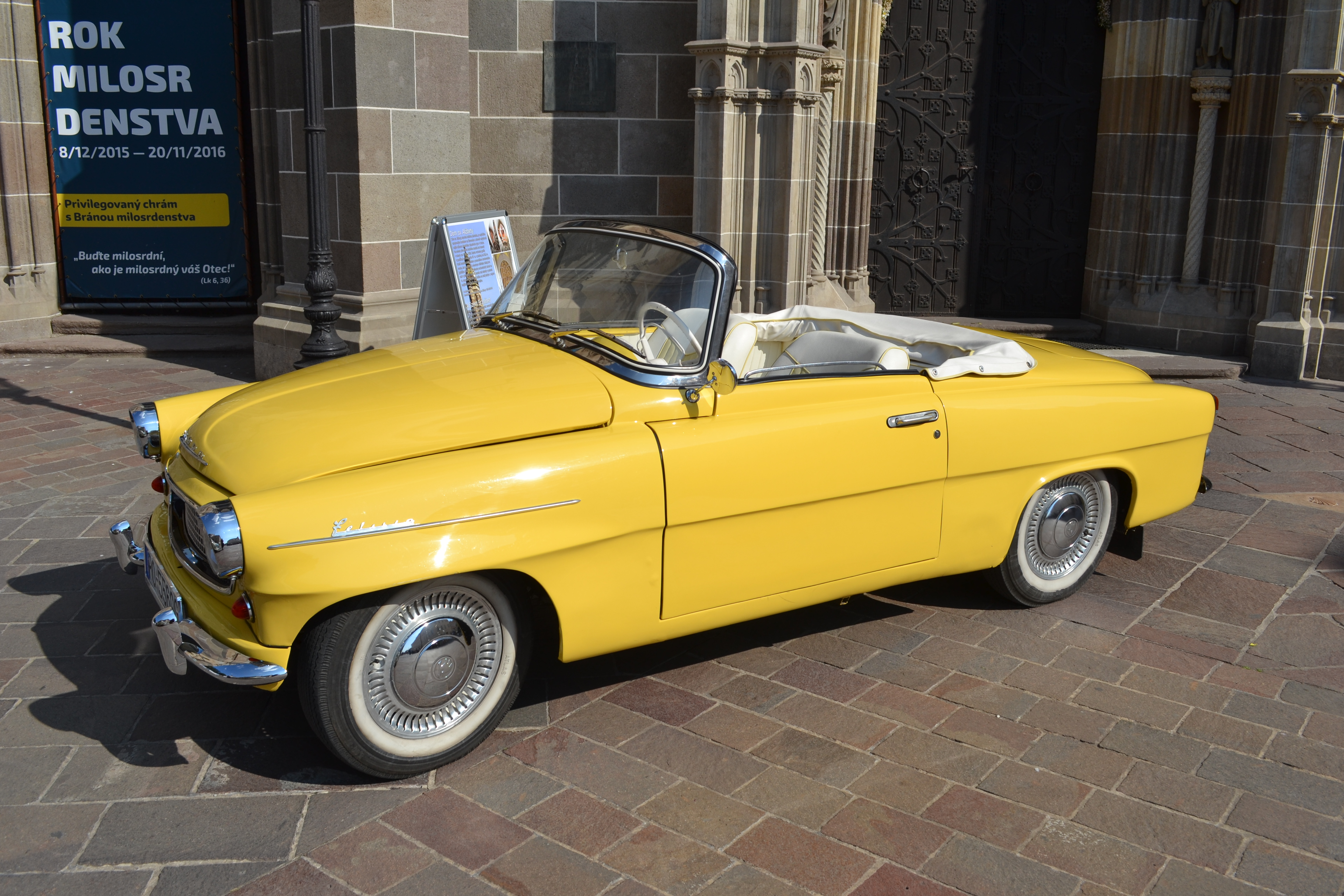 Škoda Felicia na Hlavnej ul. v Košiciach